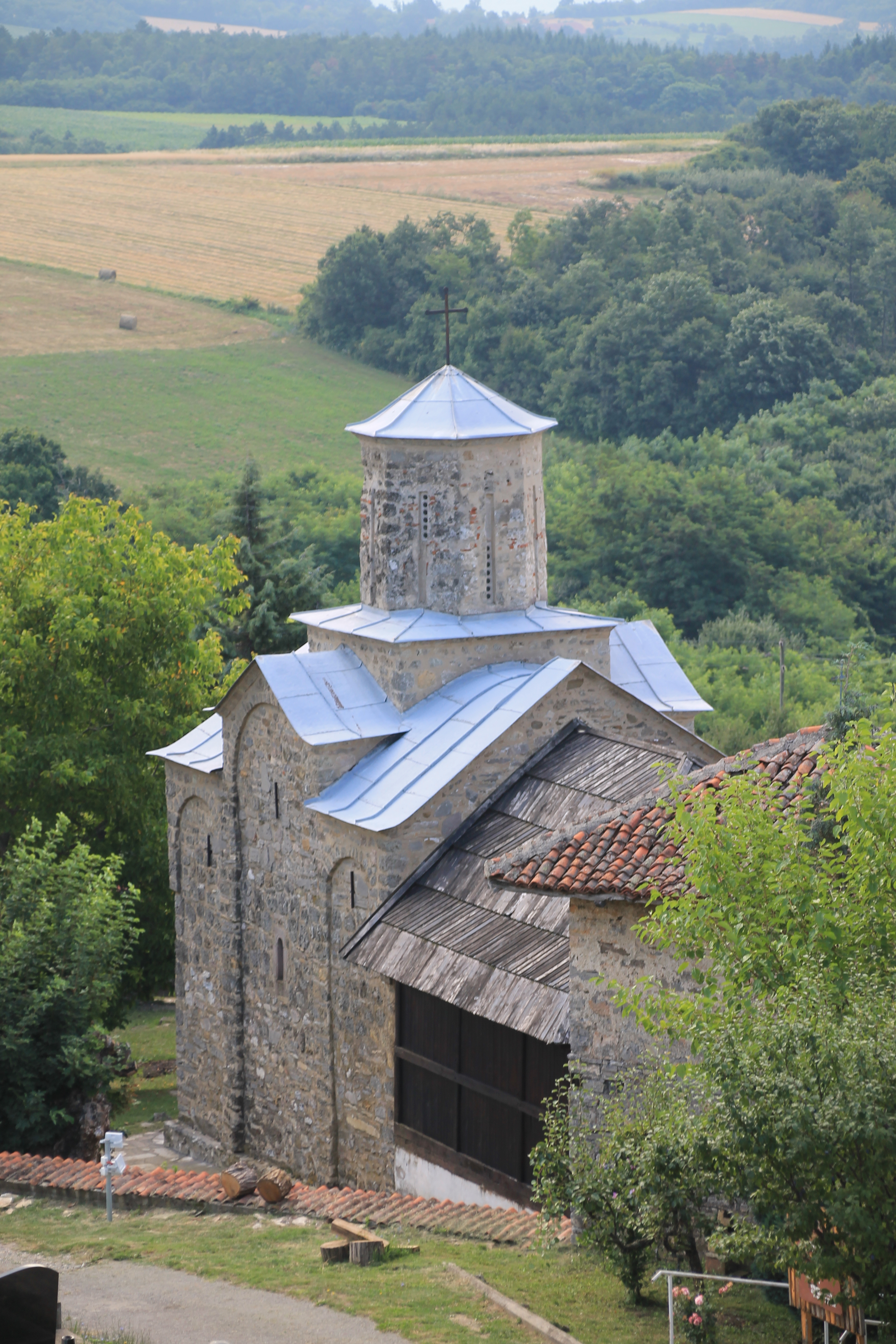 Crkva Sv. Nikole (Ramaća)